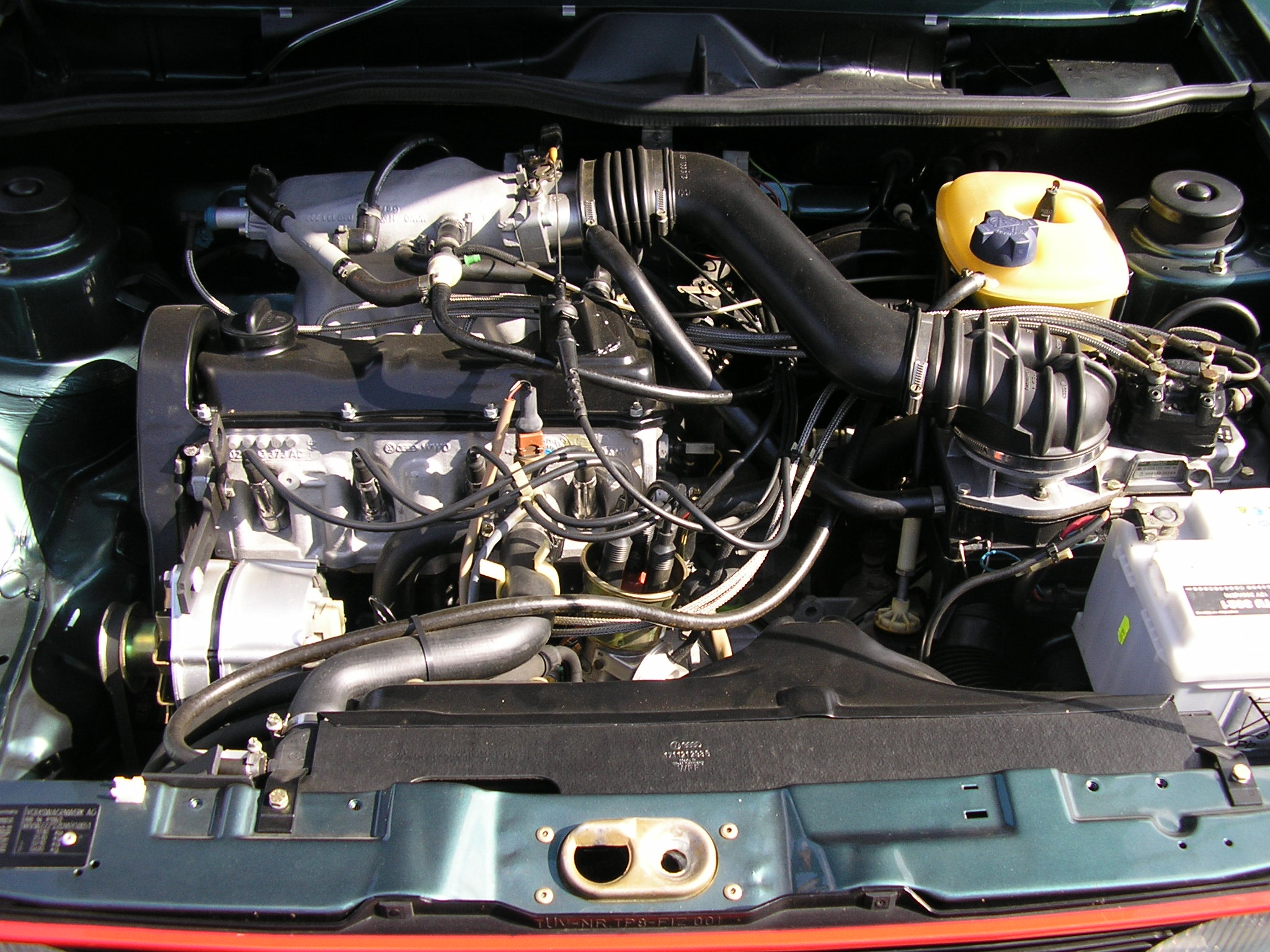 Motor VW Golf I GTI 1,8Liter/112 PS (1983).